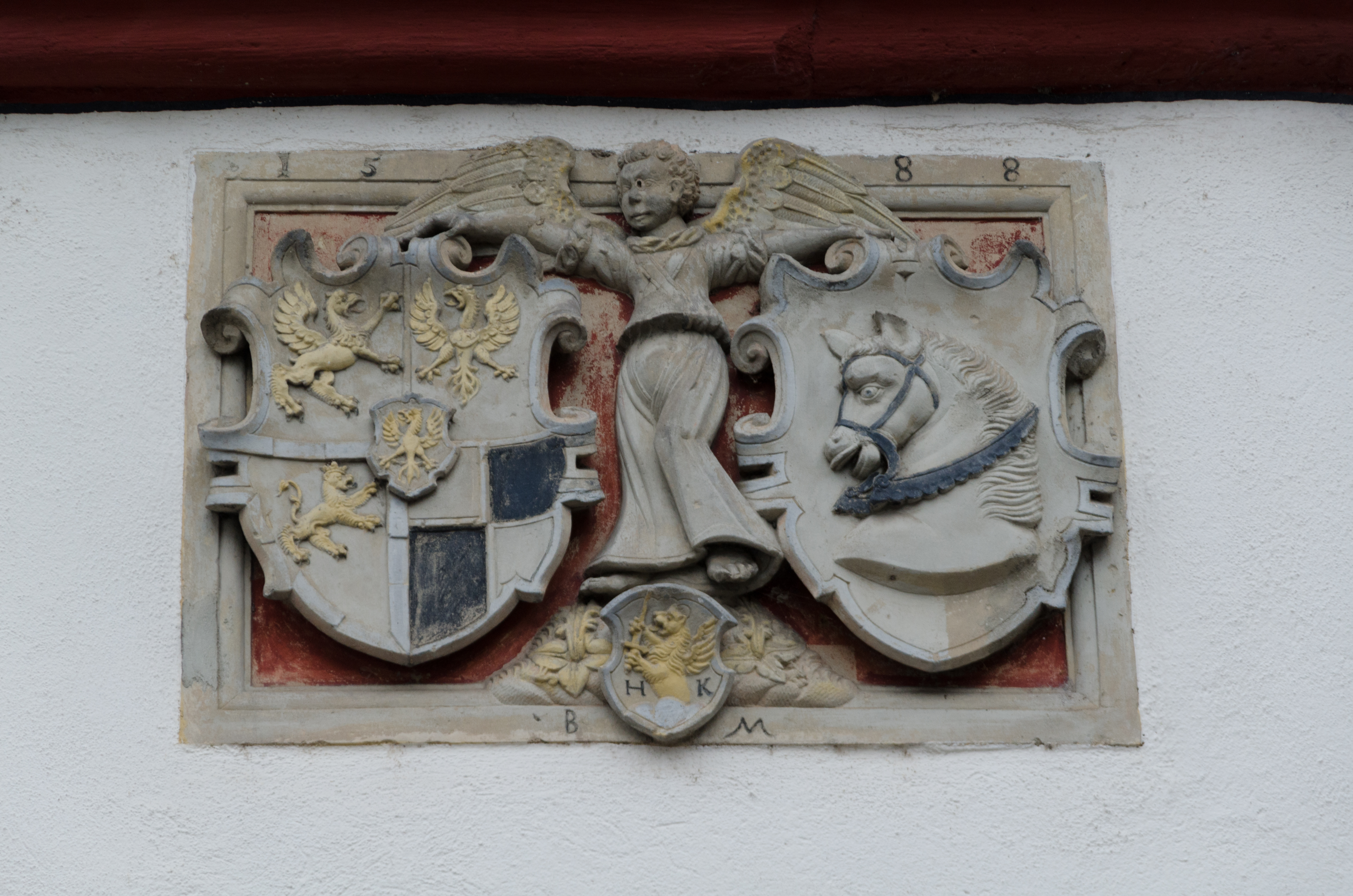 Segnitz, Hans-Kesenbrod-Straße 15, Rathaus